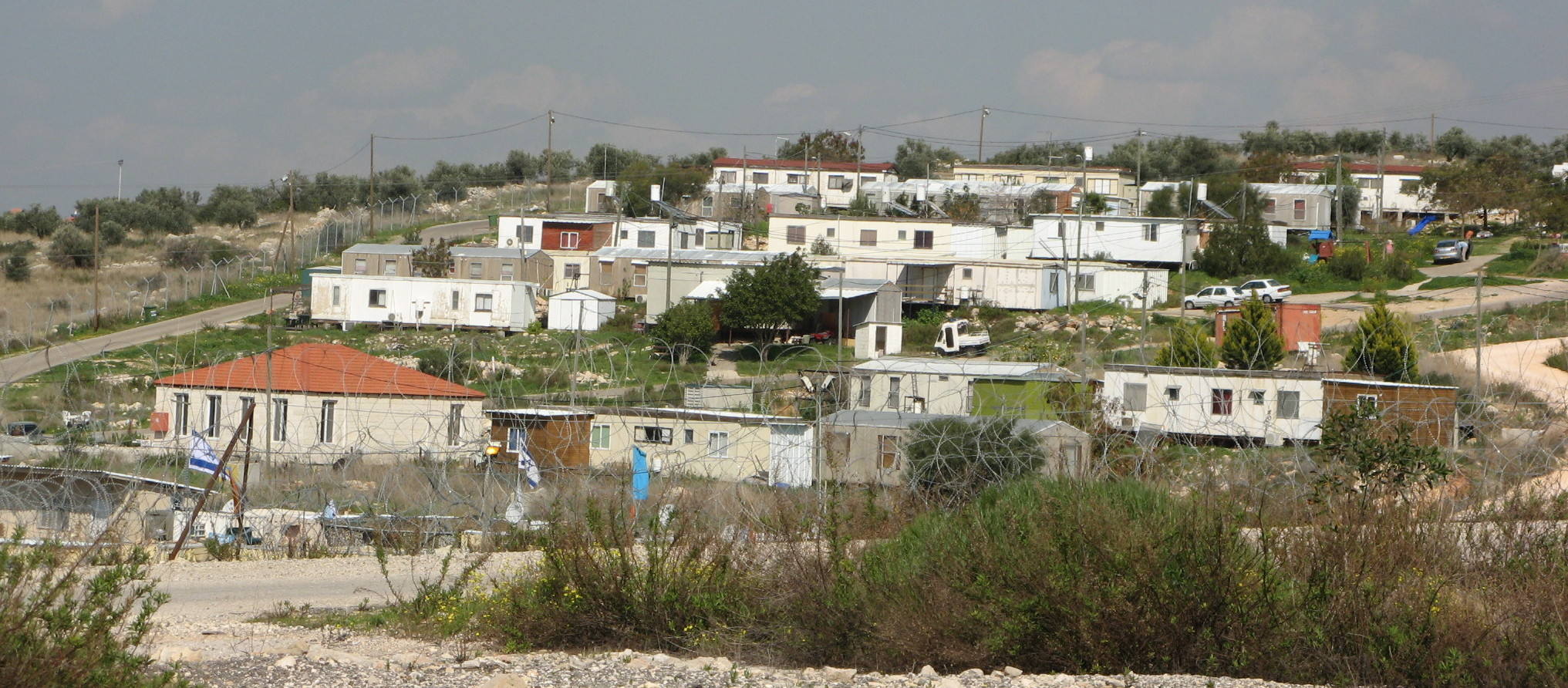 Magen Dan near Elkana